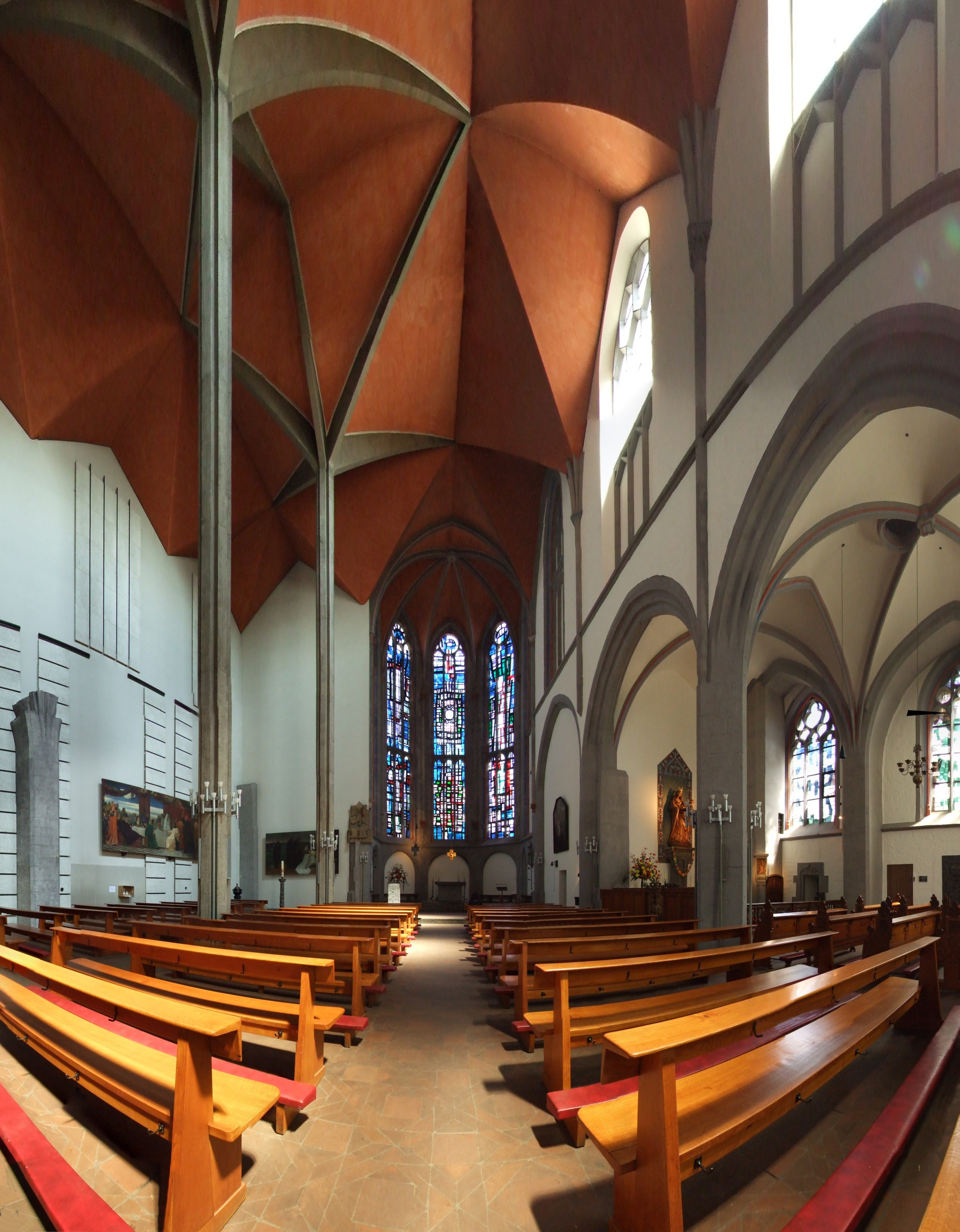 Panoramaaufnahme vom Innenraum der Kirche St. Foillan in Aachen